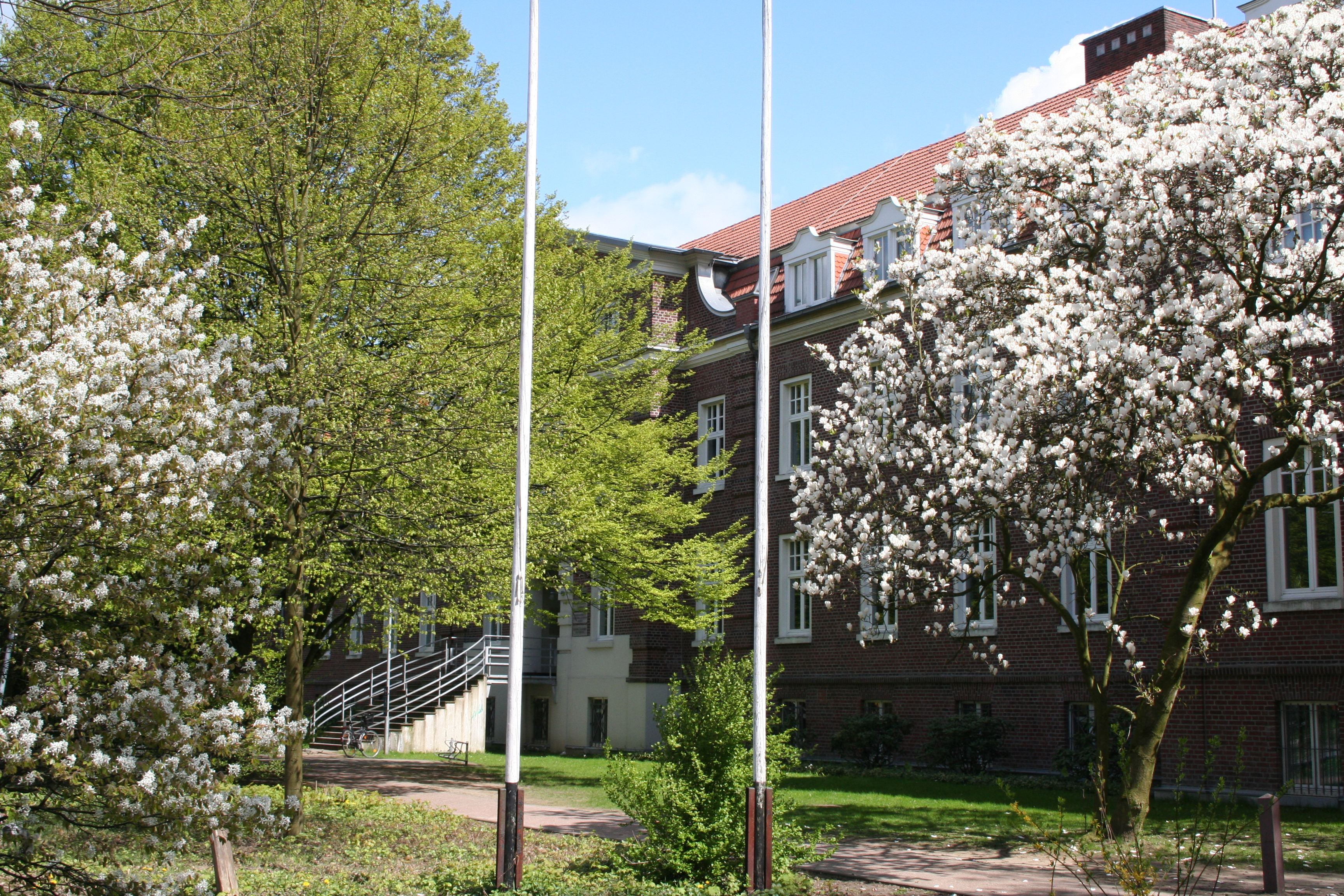 Das Bild zeigt die Dependance des Albert Schweiter Realschule am Stnerner Weg 14